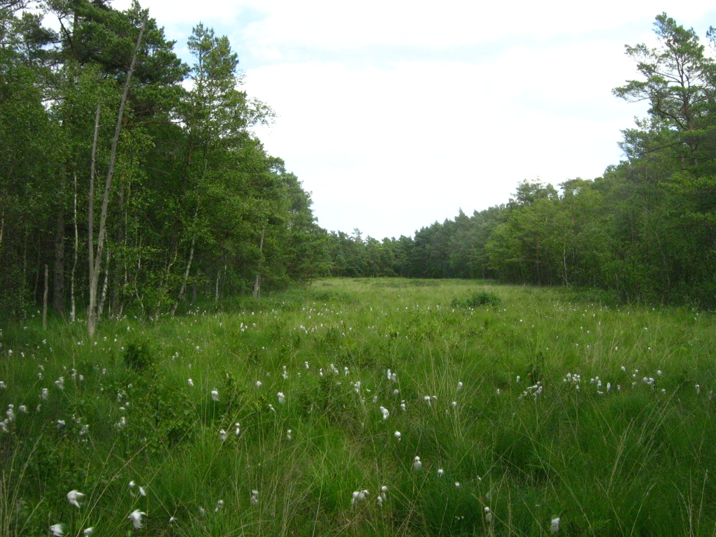 Das Dänschenburger Moor ist eines der größten Hochmoore Norddeutschlands. Durch Wasserabsenkung ist das Moor inzwischen fast vollständig mit Kiefern und Birken bewaldet. Der baumlose Streifen auf dem Foto ist die freigehaltene Schußschneise eines Jägers. Das Foto wurde von seiner Kanzel aus gemacht. (NSG „Großes Moor bei Dänschenburg“ N21, 71 ha, Gemeindegebiet der Stadt Marlow, Landkreis Nordvorpommern, Mecklenburg) - Google Maps - Google Earth